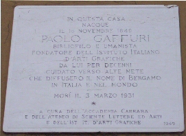 Fotografia della lapide commemorativa posta nella casa che fu di Paolo Gaffuri